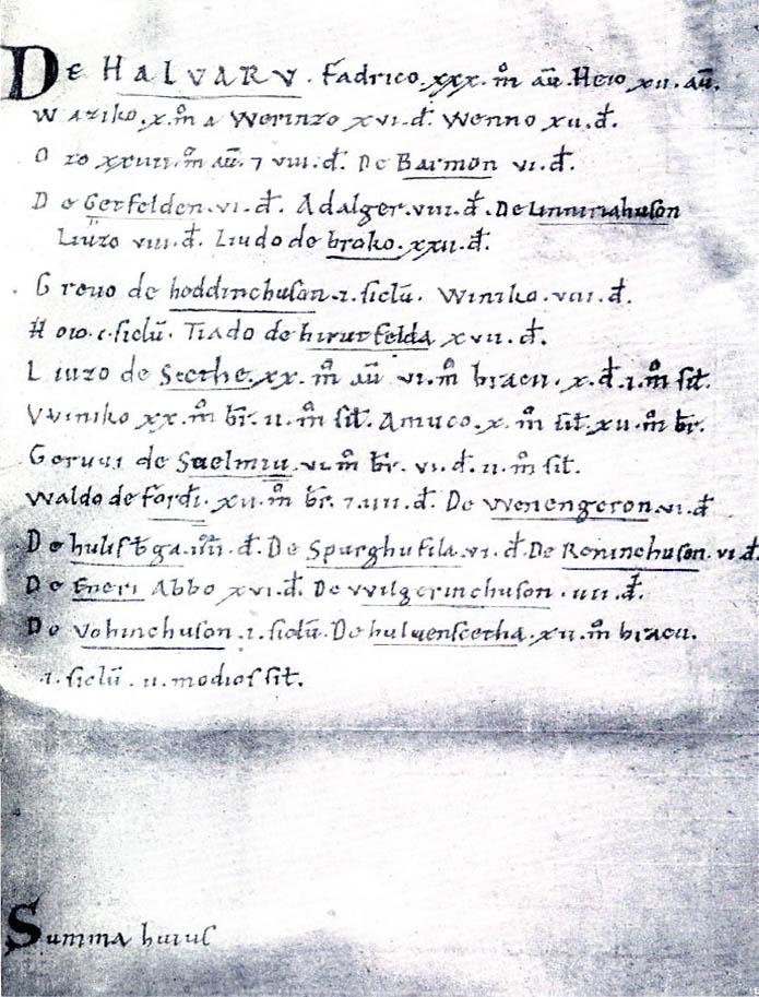 Hochmittelalterliche Abgabenliste des Kloster Werden aus dem Jahr 1070 - Erstnennung von Barmen